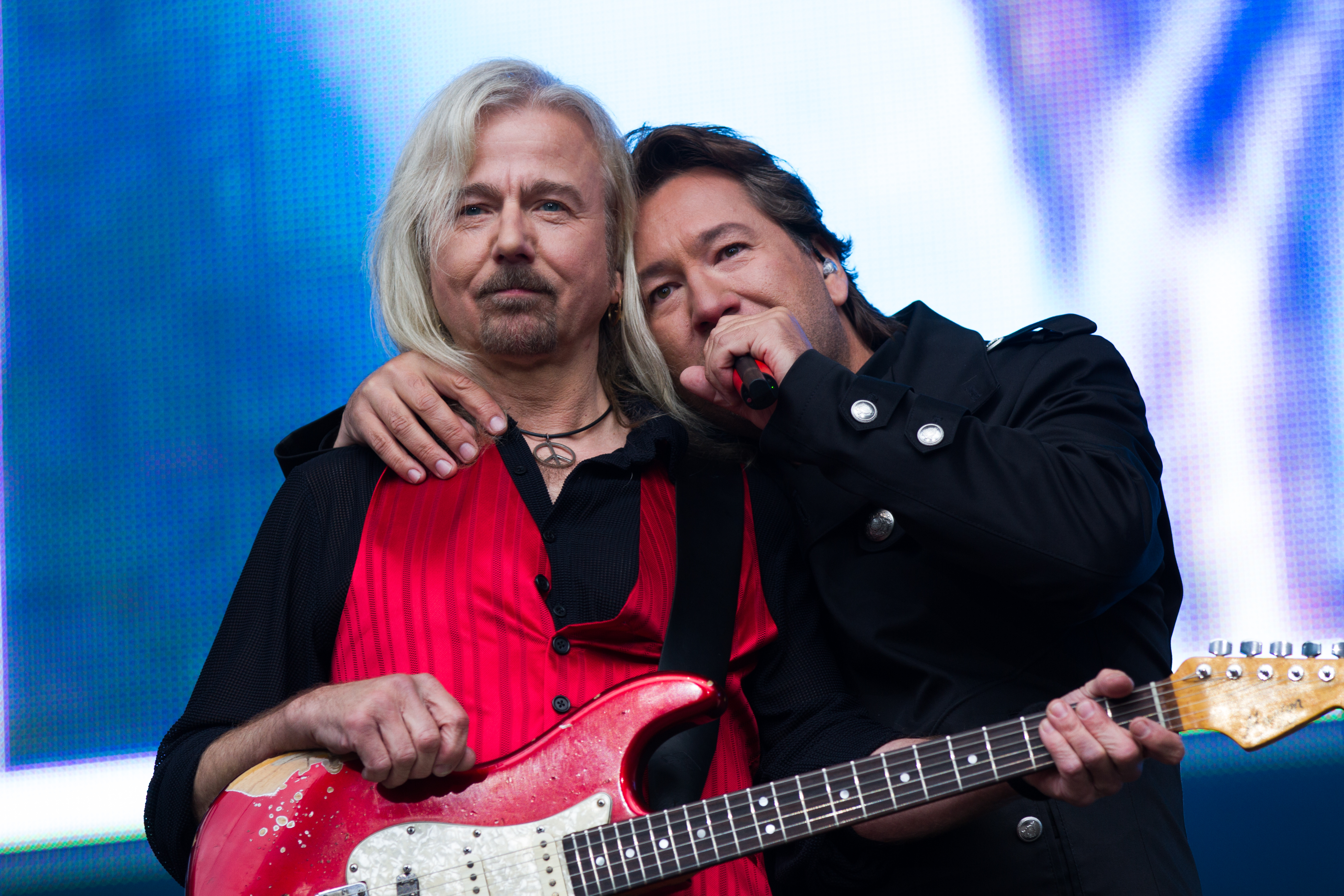 Claudius Dreilich und Bernd Römer von Karat beim "Karat 40 Jahre KARAT - Das EINZIGE Jubiläumskonzert" in der Berliner Waldbühne am 20.06.2015